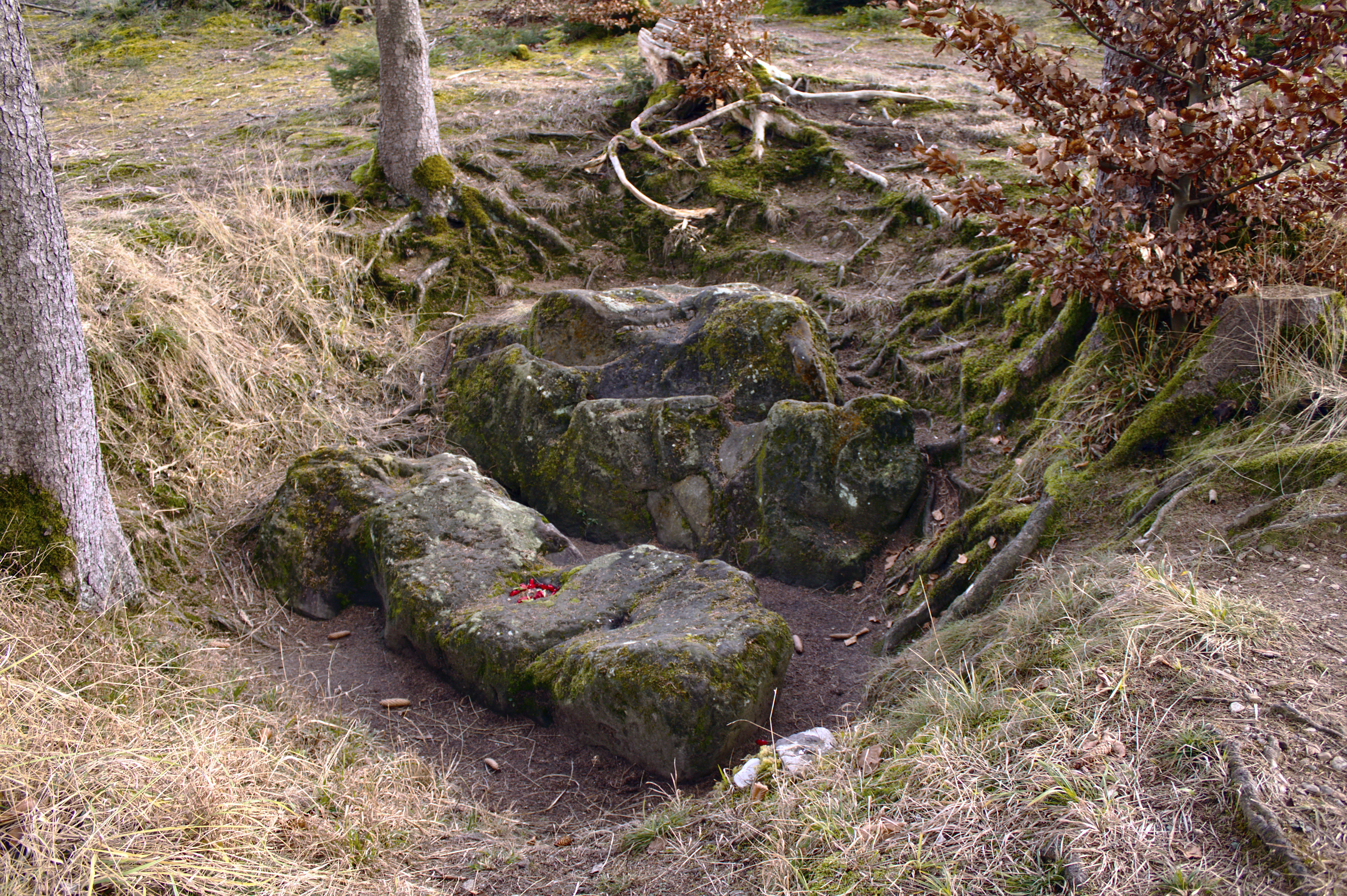 Die sogenannten Opfersteine zwischen Schöngeising und Grafrath, Landkreis Fürstenfeldbruck, Bayern.